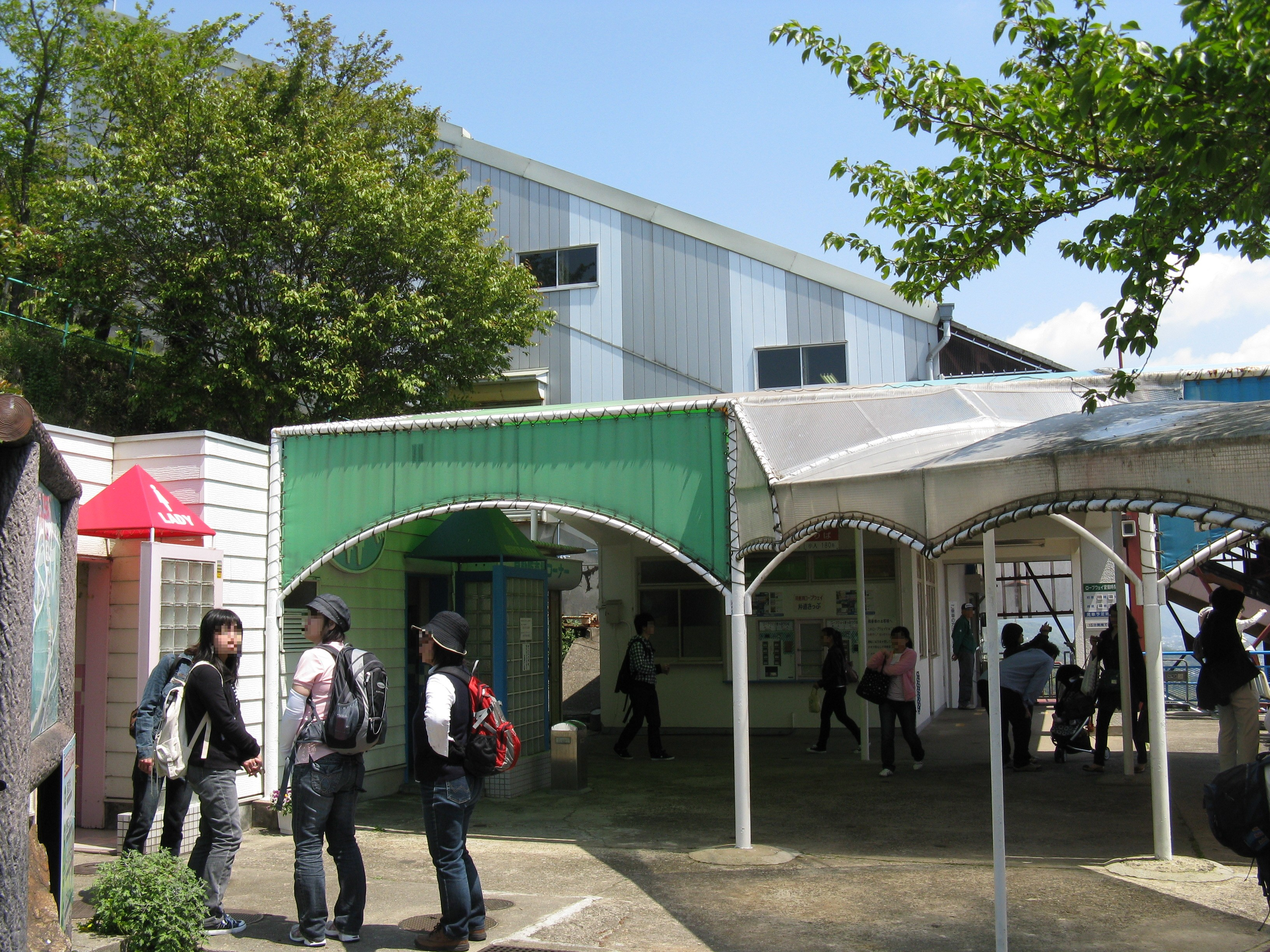 須磨浦ロープウェイ 鉢伏山上駅